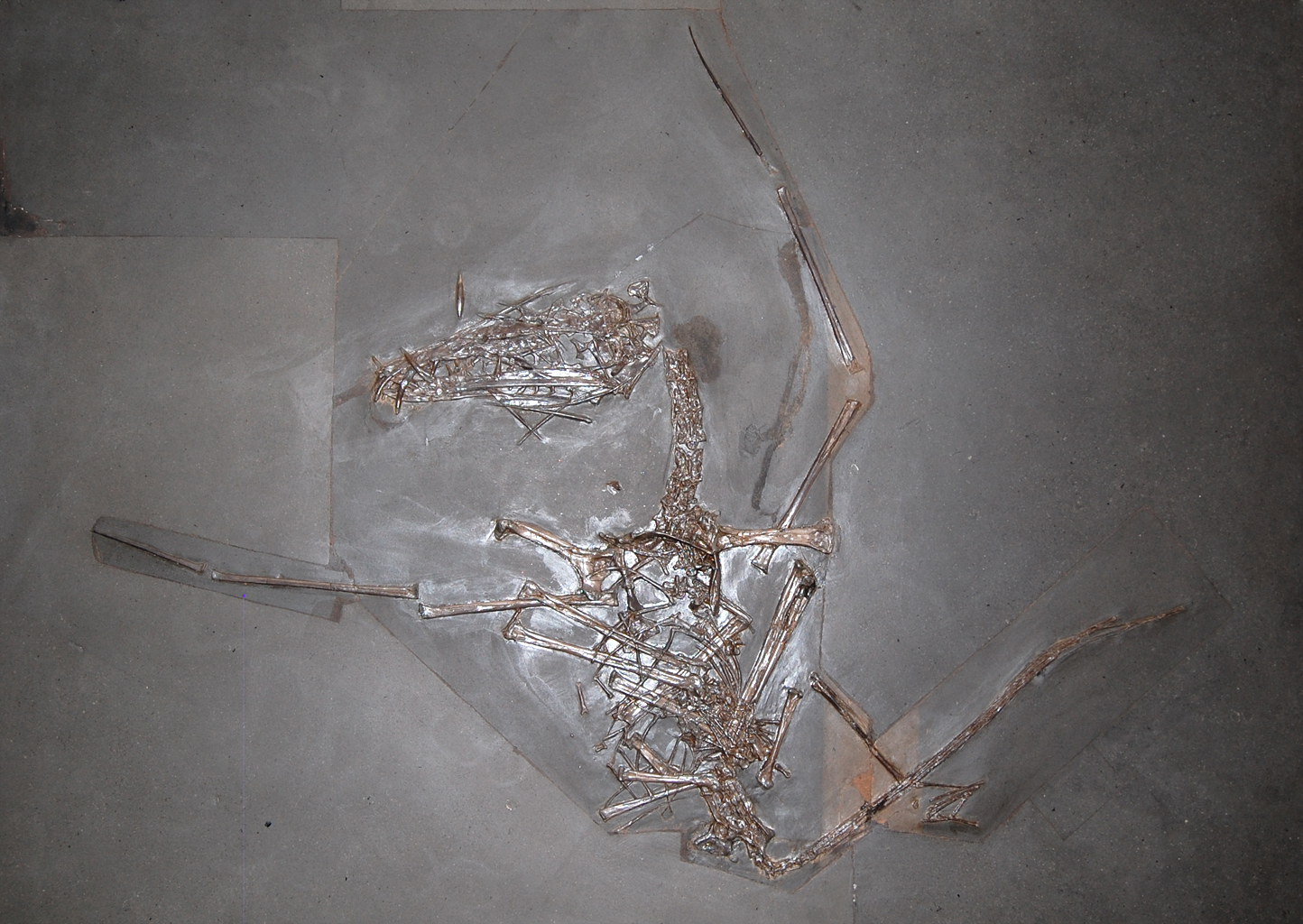 Naturhistorisches Museum Wien